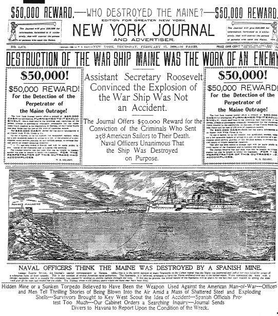 O caso Maine na Prensa Amarela USA, 17 febreiro de 1898